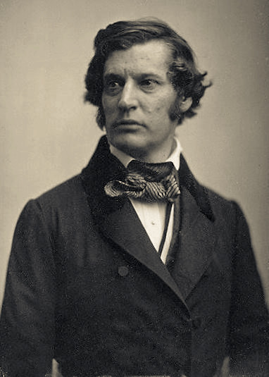 Charles Sumner daguerreotype